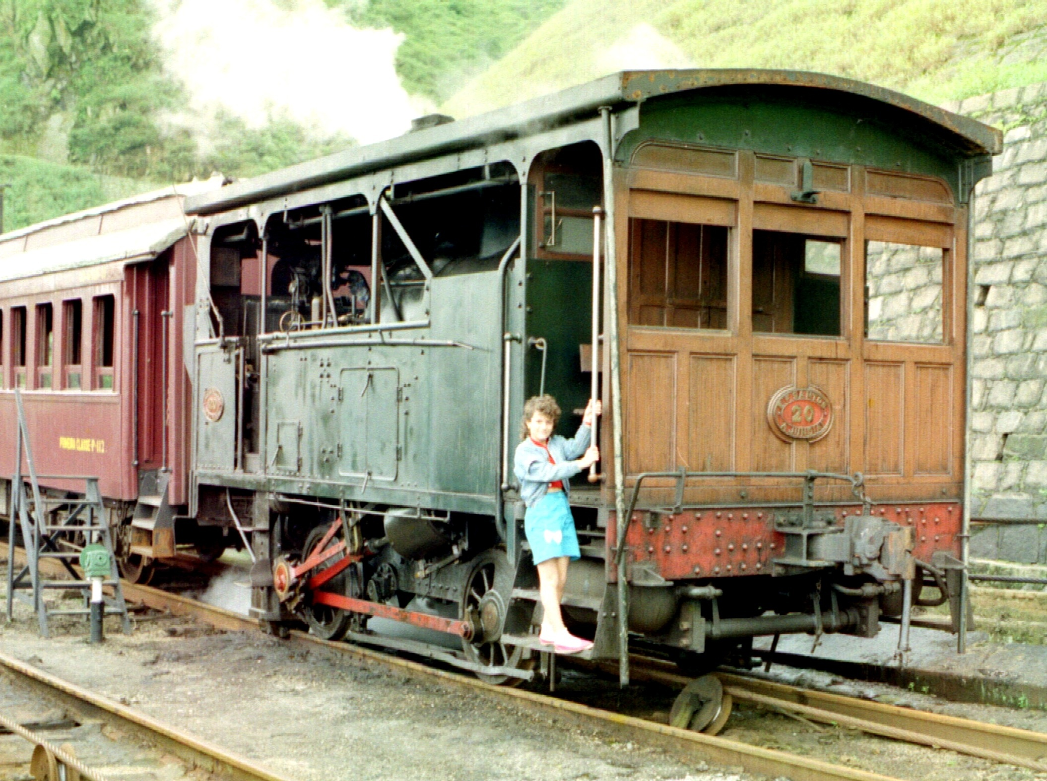 Paranapiacaba - Santo André - SP - Brasil. Locobreque funcionando só para turistas. Foto de Paulo Carmona Sanches Neto - 1987